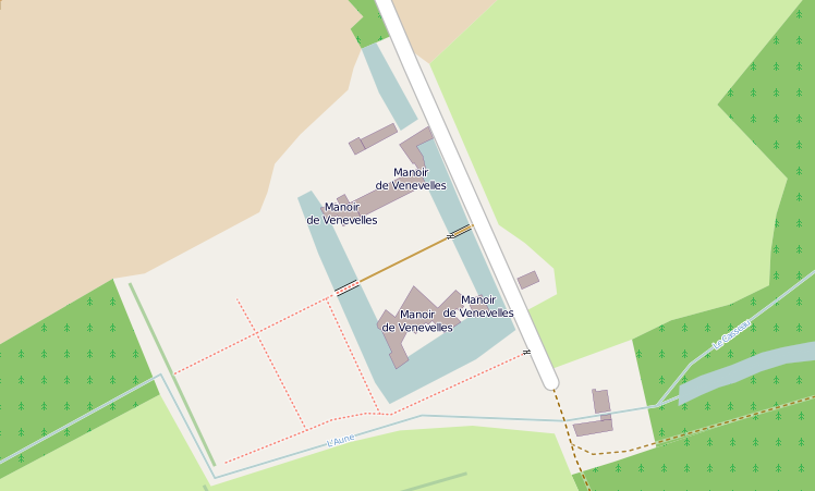 Plan général des bâtiments du manoir de Venevelles sur la carte OpenStreetMap.